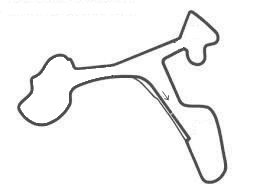 Streckenskizze Circuito Ascari seit 2003